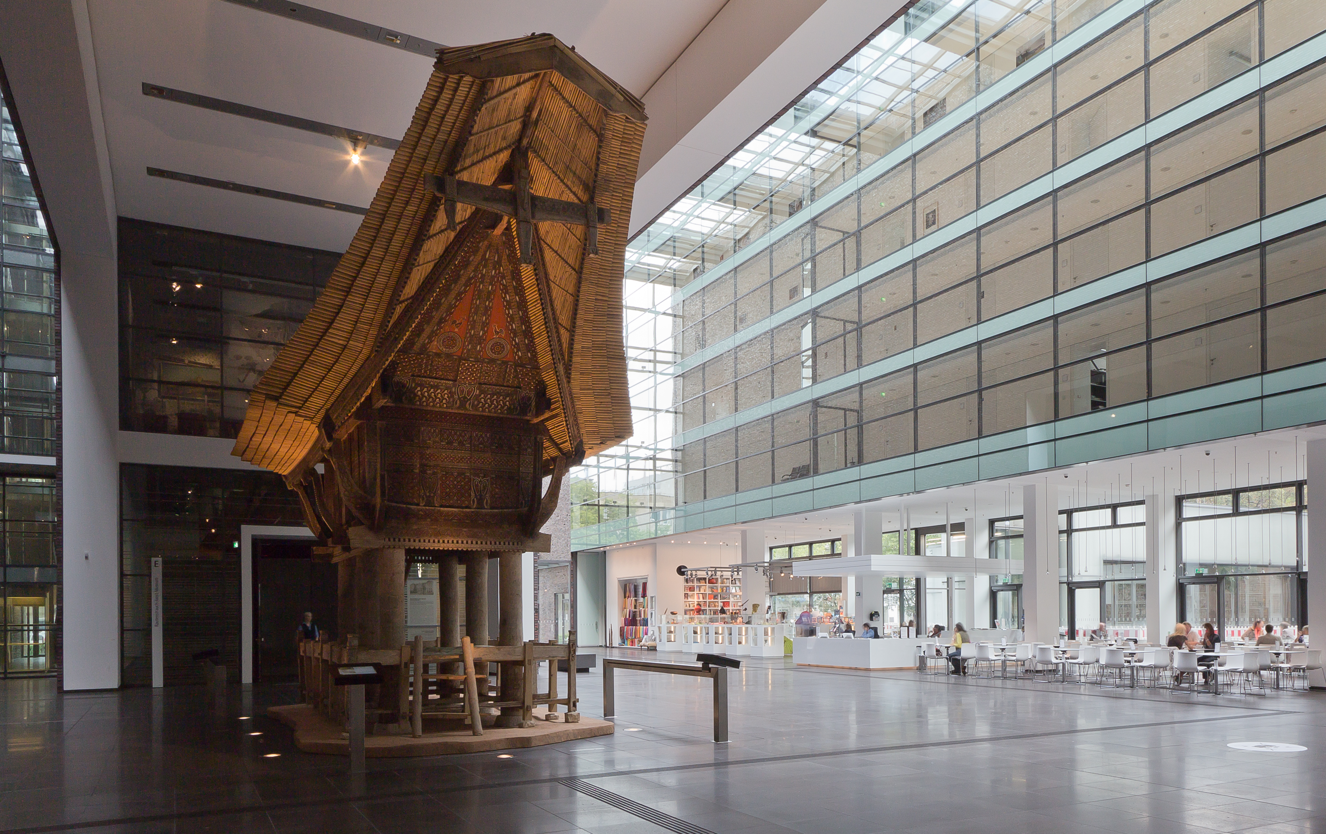 Reisspeicher alang sembang, Pantanakan Lolo, Region Kesu’, Sa’dan Toraja/Tana Toraja, Südsulawesi, Indonesien, Südostasien. Er ist im Foyer des Kulturquartiers aufgebaut.